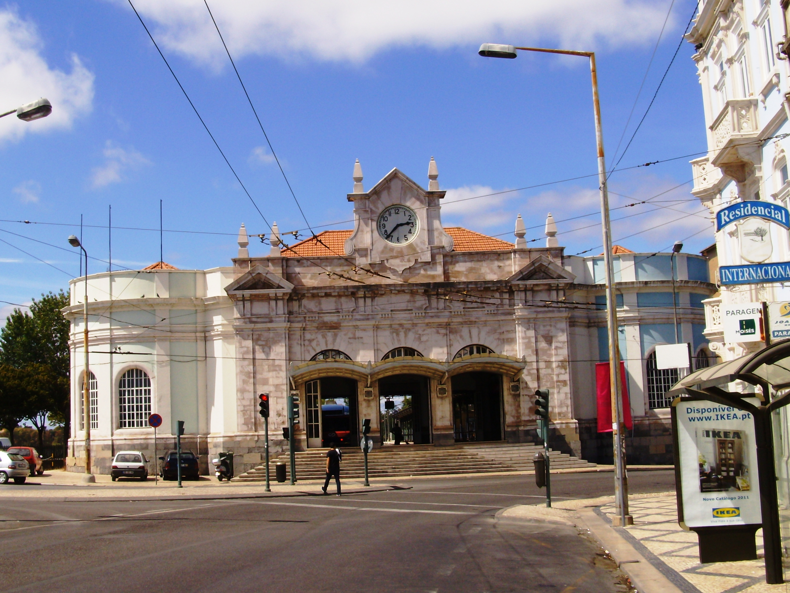 Estação de Caminhos de Ferro Coimbra A, Coimbra, Portugal.